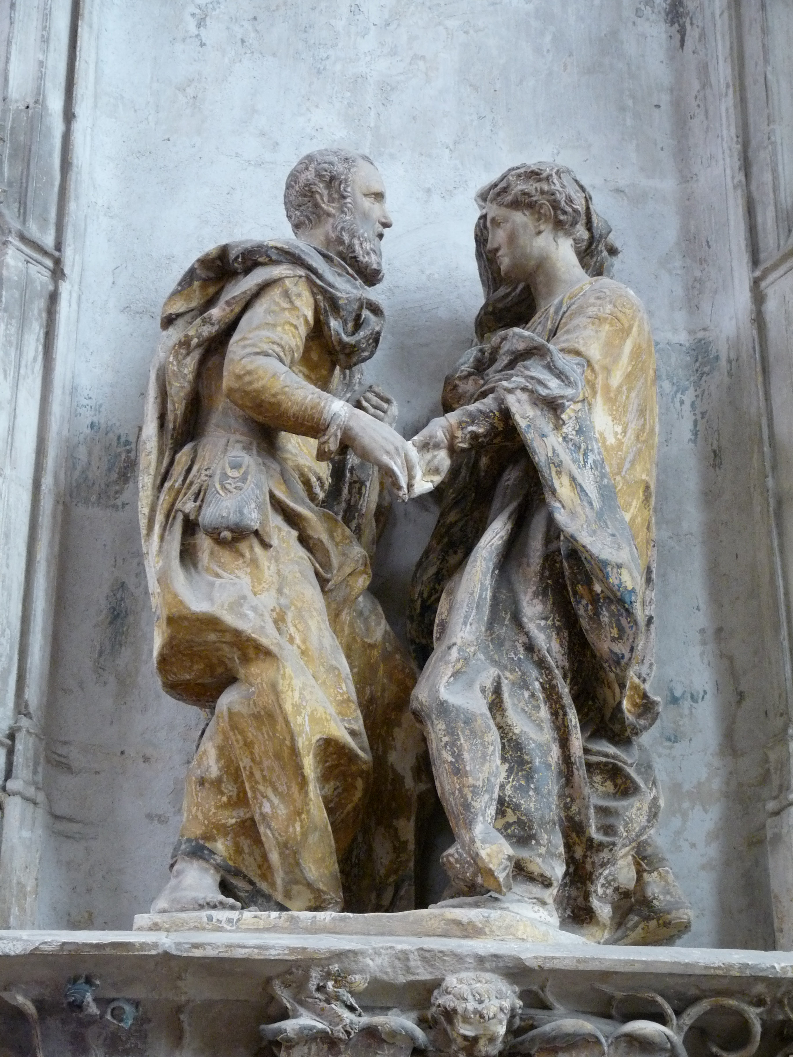 Rencontre de Sainte-Anne et Saint-Joachim à la porte dorée. Groupe sculpté de Saint-Pantaléon de Troyes, attribué à Dominique Florentin (avant 1554).